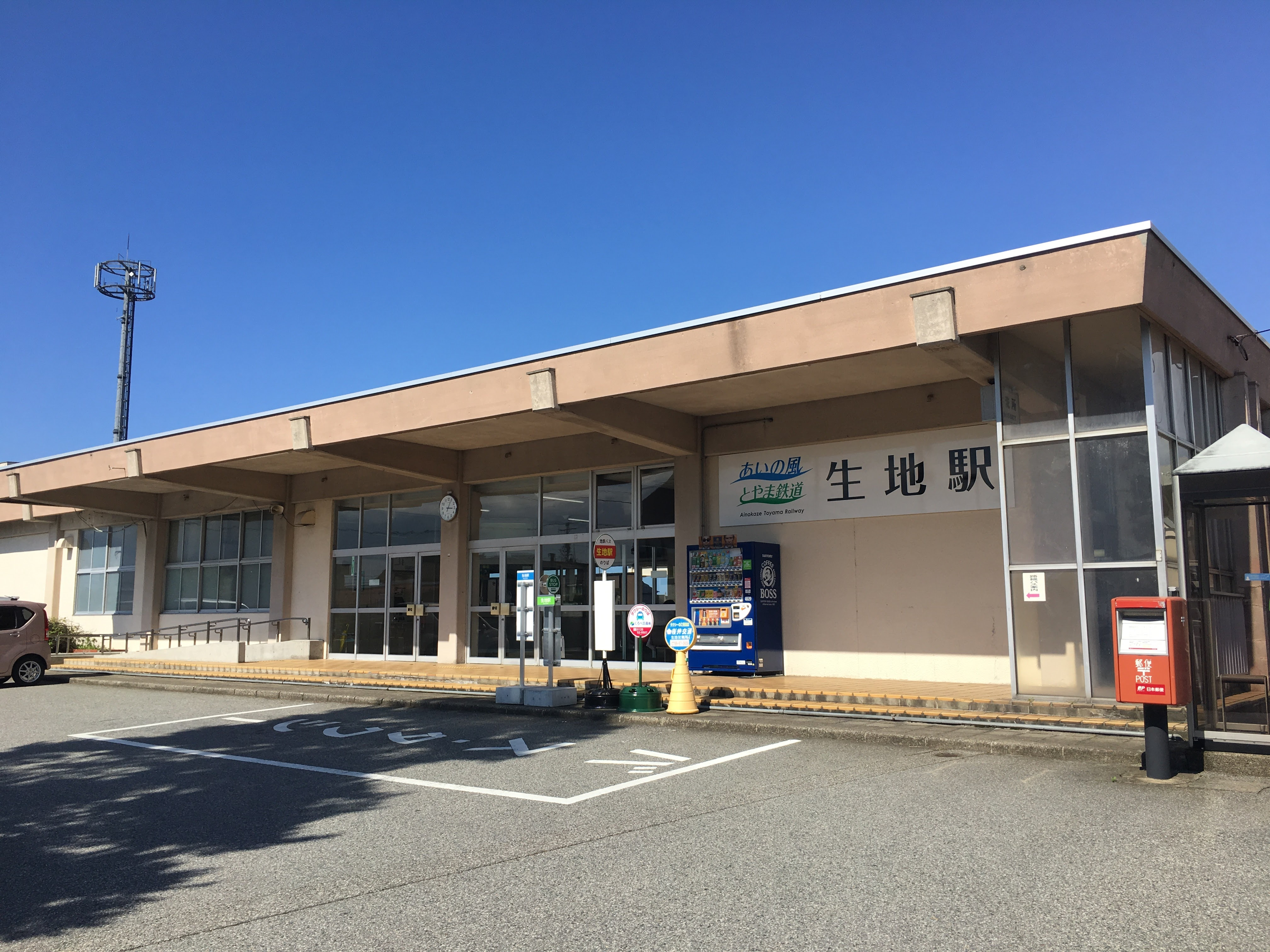 生地駅駅舎